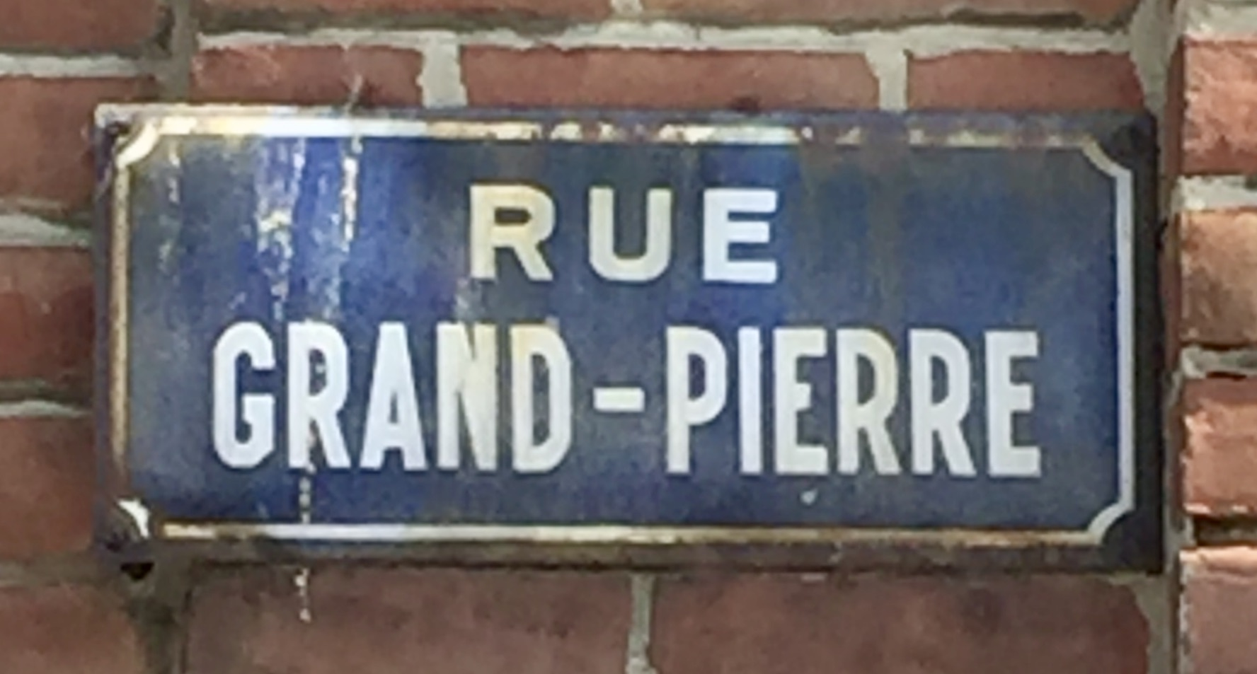 Photos de plaques de rues prises dans la commune d'Étaples